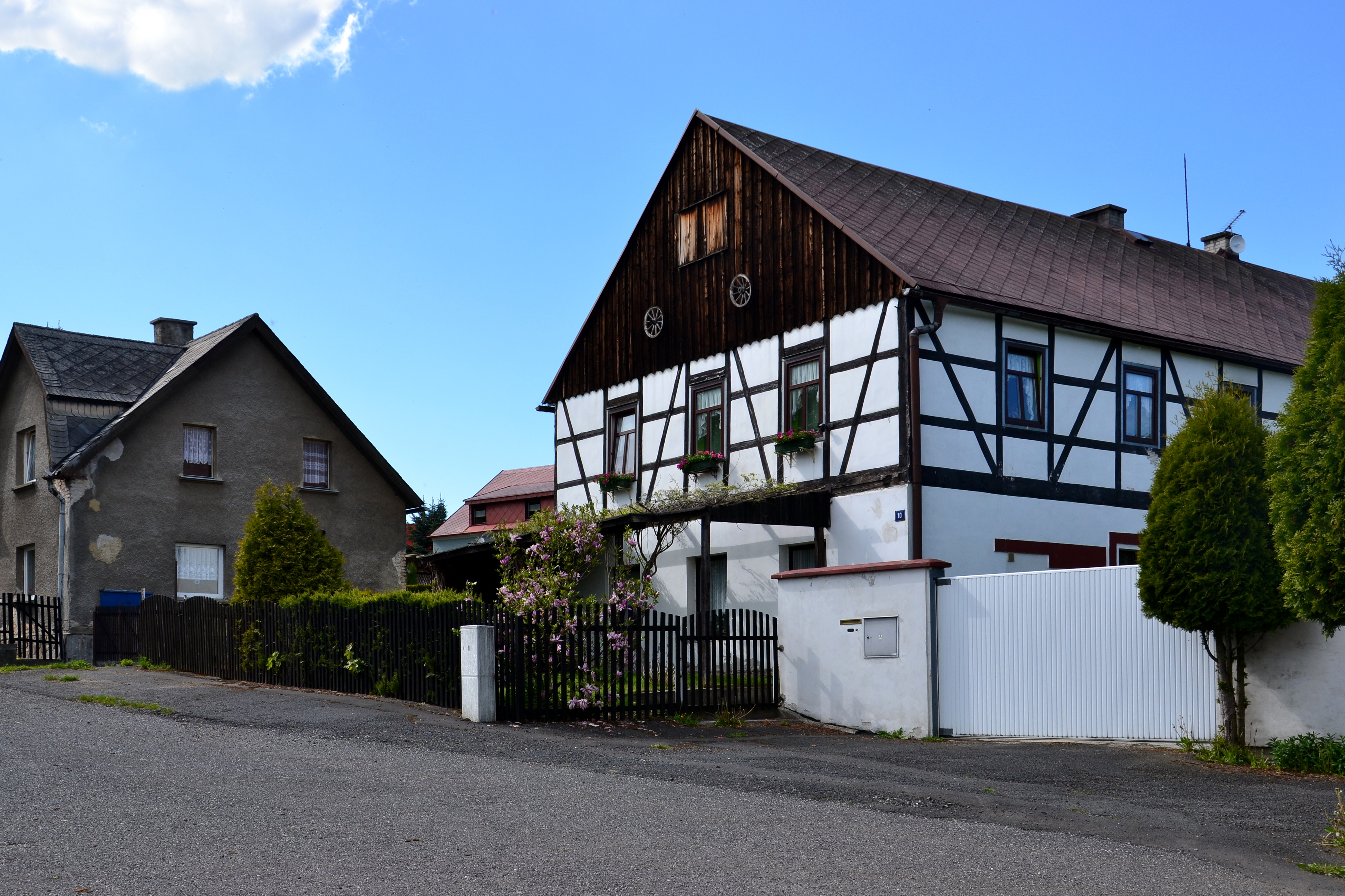 Dům čp. 10